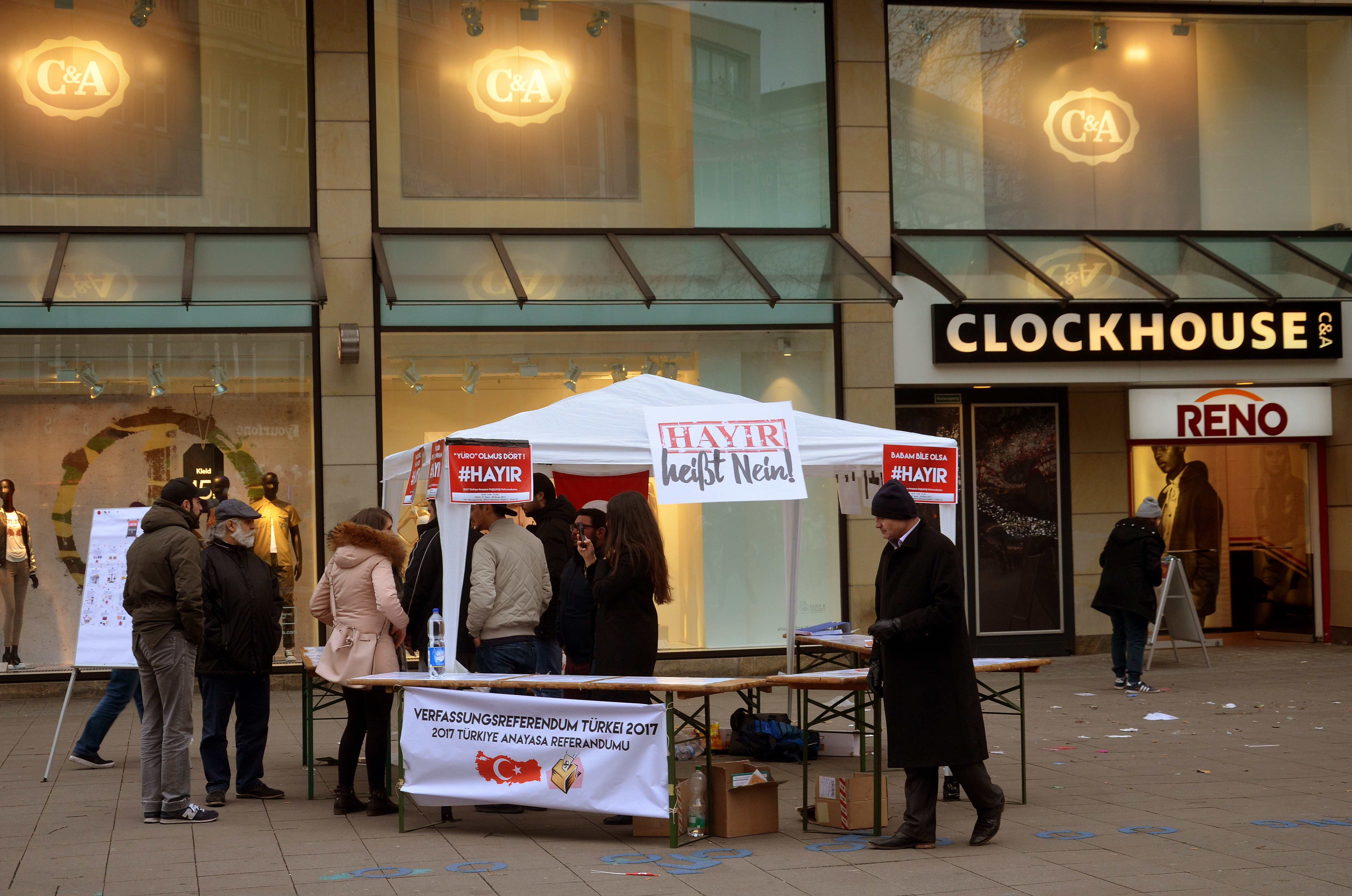 Infostand am 18. März 2017 am Schillerdenkmal in Hannover vor dem Modehaus C & A zum Verfassungsreferendum der Türkei 2017 mit dem Signal „Hayir heißt Nein“ ...